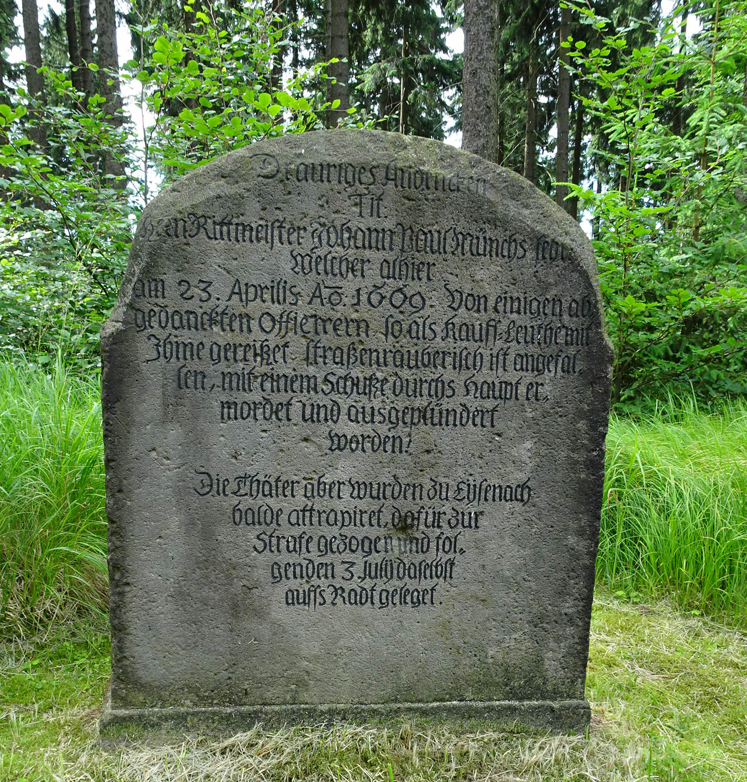 Im Wald bei Reitzenhain, Erzgebirgskreis